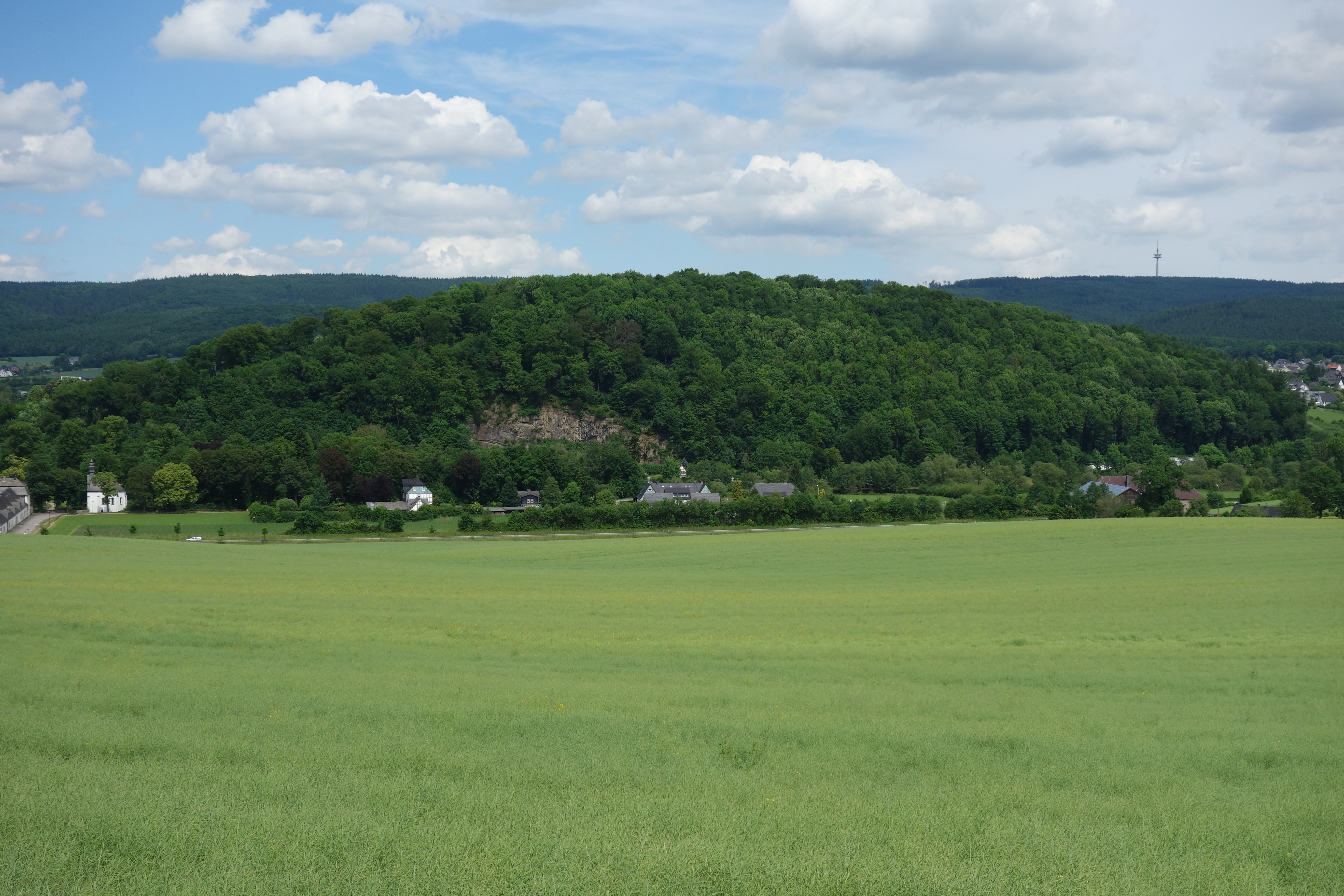 NSG Hainberg von Süden im Bildmitte. Nur Hügel mit Laubwald gehört zum NSG.